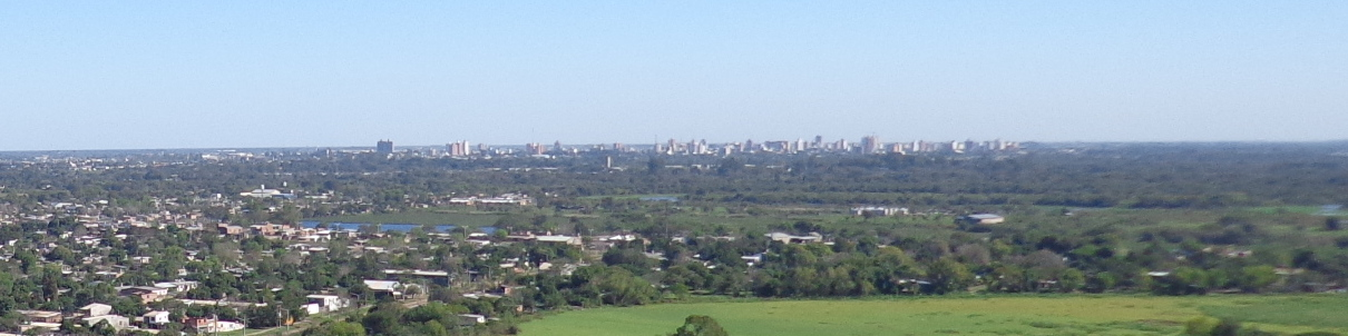 Vista al centro de Resistencia desde los silos de Barranqueras